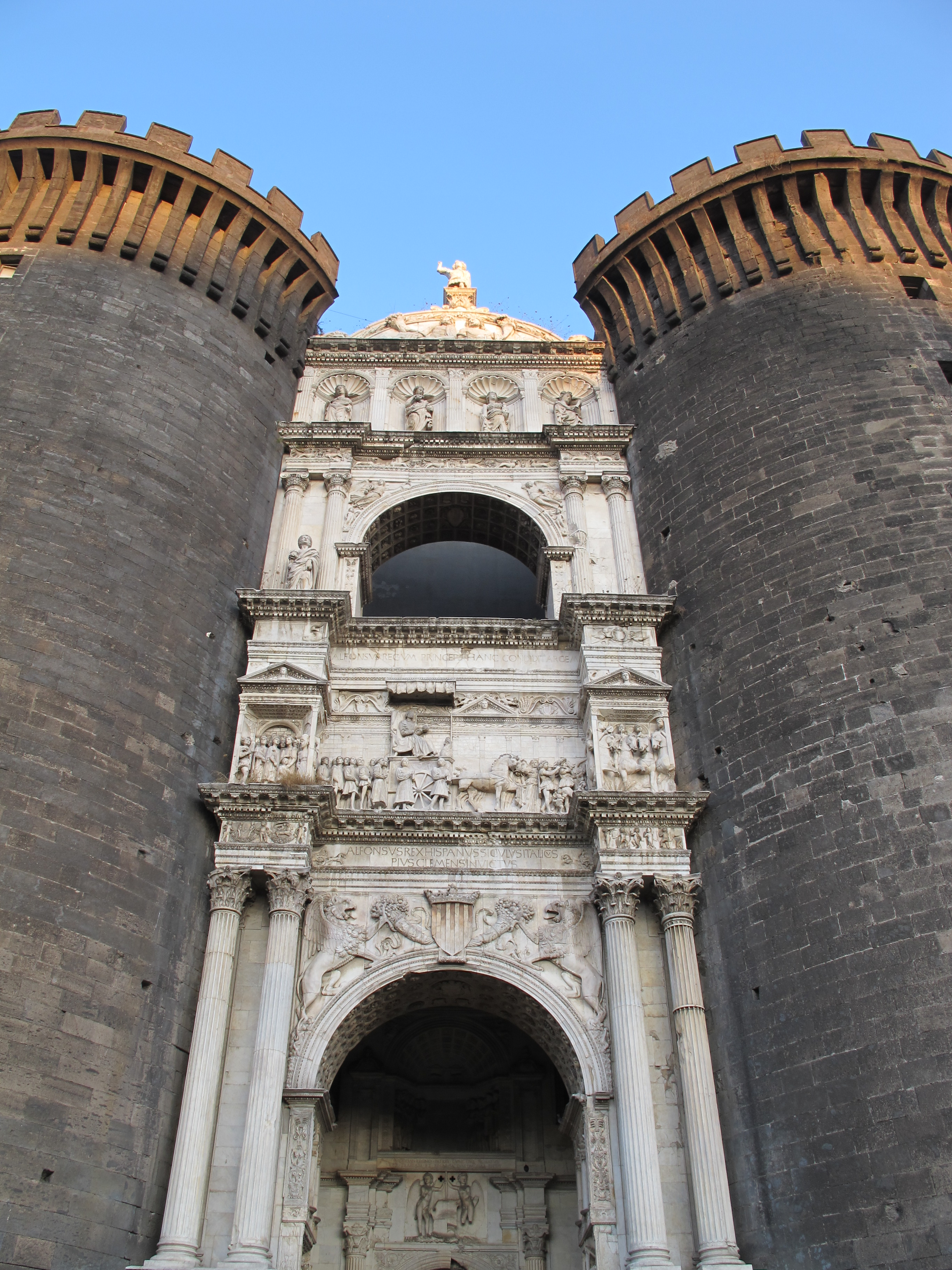 Arco Trionfale del Maschio Angioino di Napoli